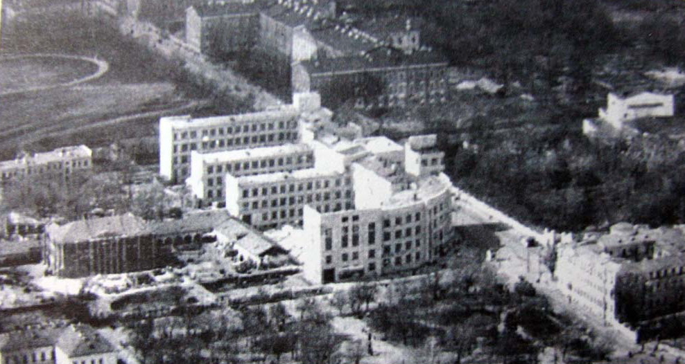 Строительство здания управления ЮВЖД